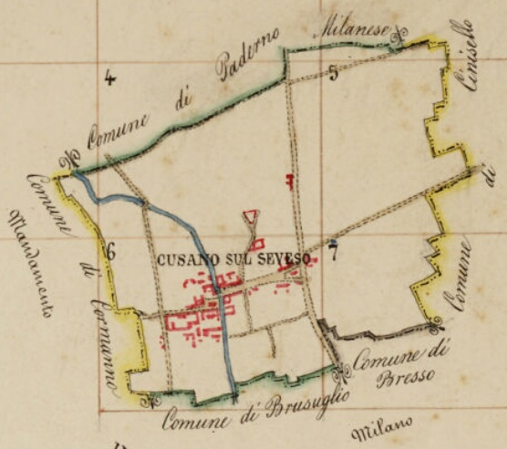 Particolare di una mappa catastale che rappresenta il Comune di Cusano sul Seveso